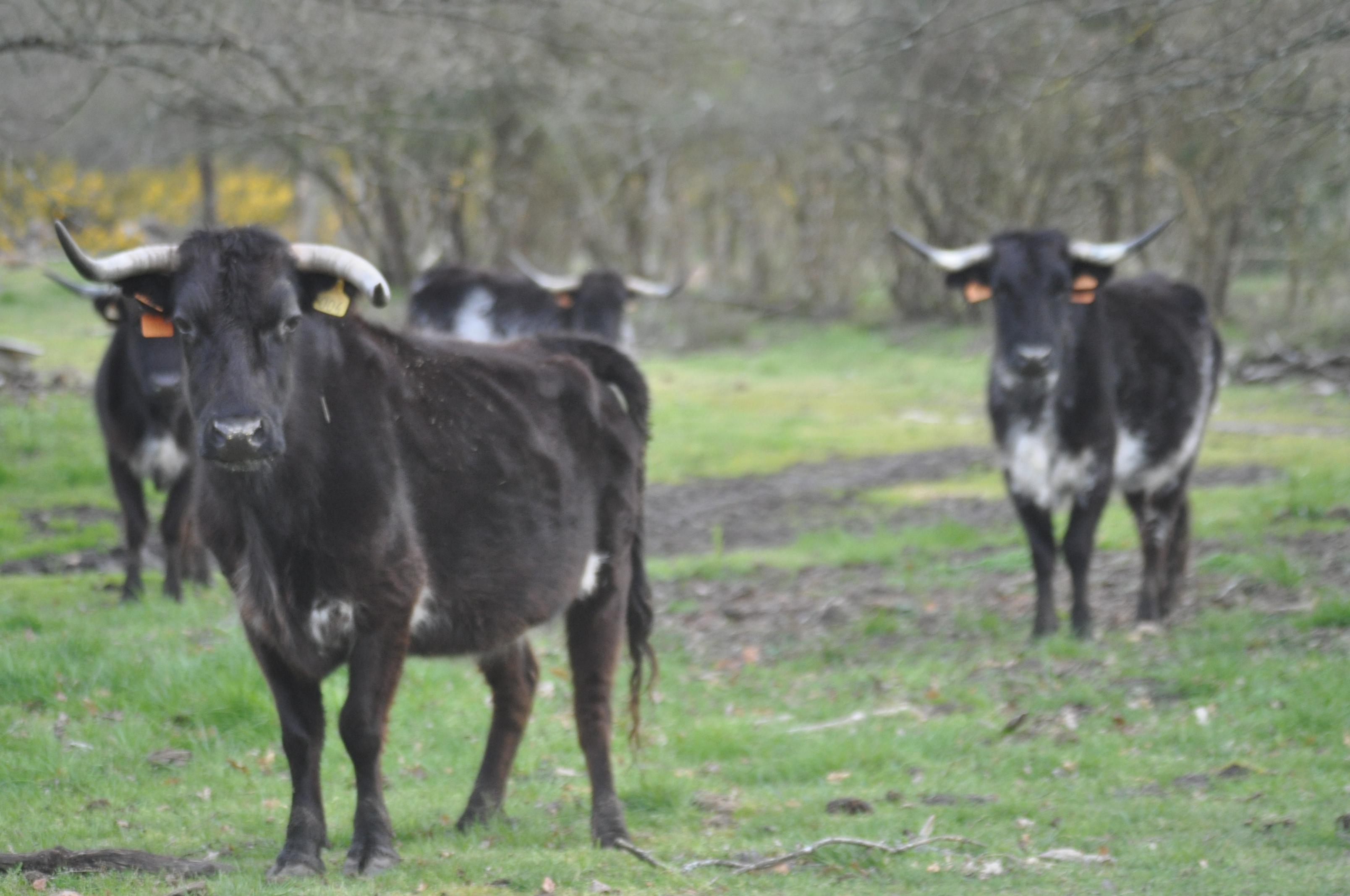 Elevage de taureaux dans une ferme landaise (Brocas (40), France